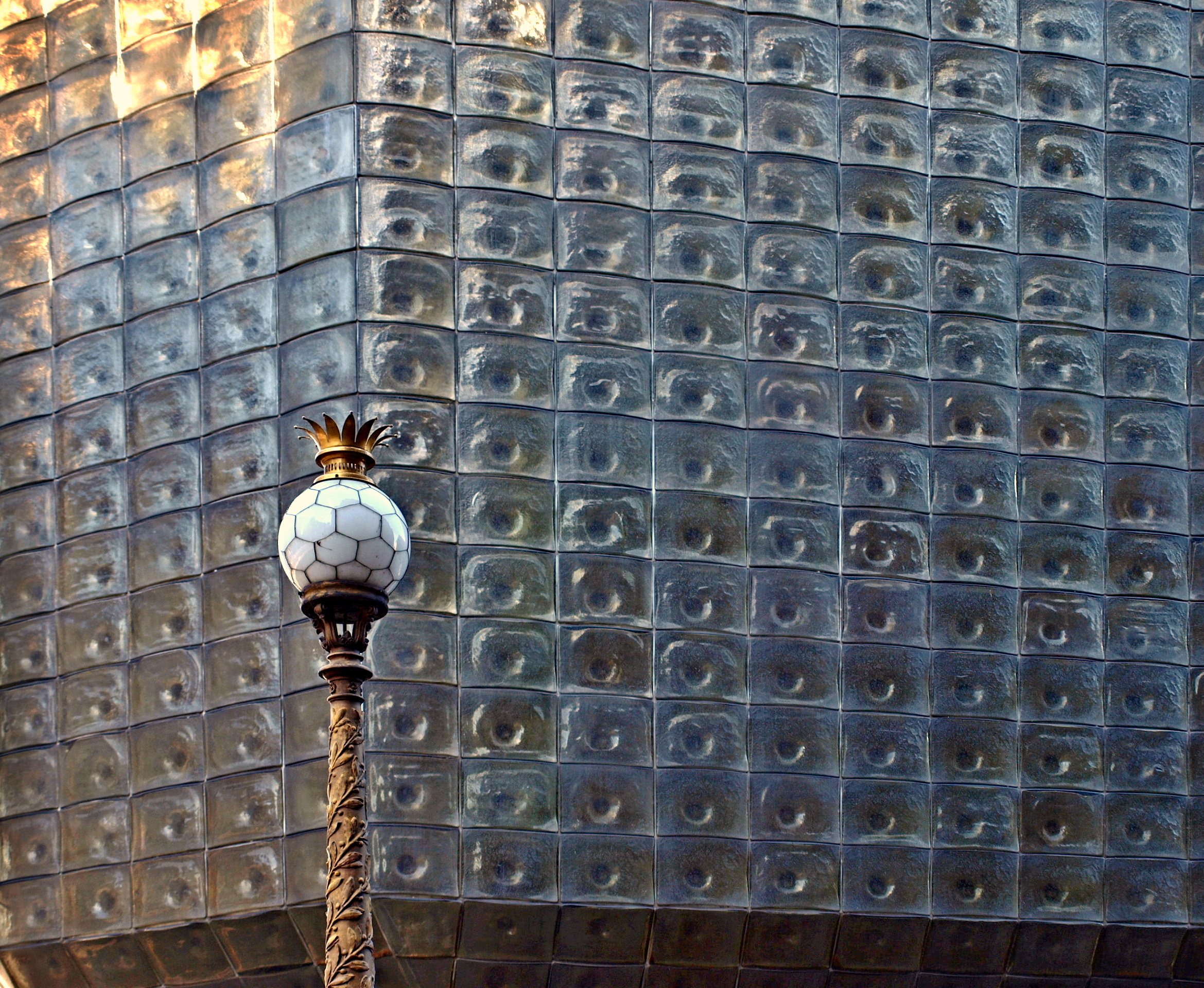 Nová scéna ND v Praze